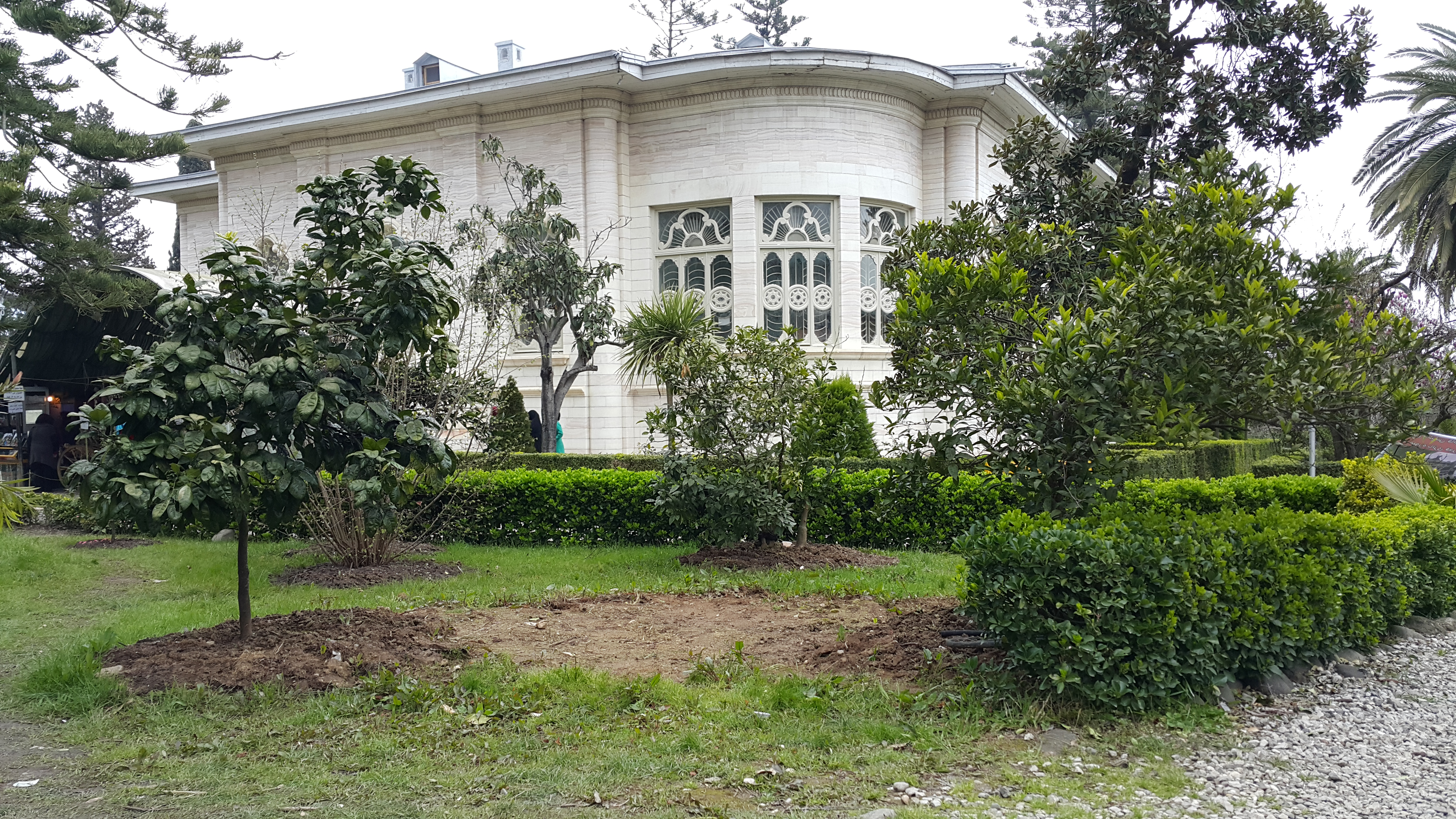 باغ رامسر و مستحدثات واقع درآن